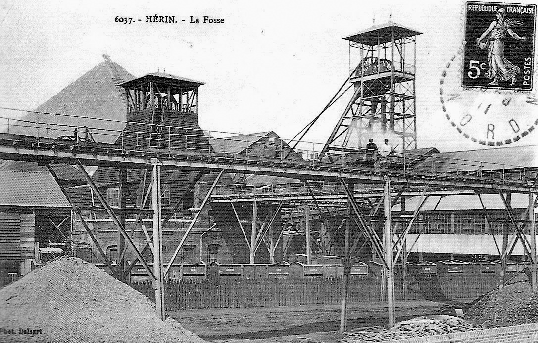 Ancienne Fosse Hérin ayant cessé toute extraction en 1936.